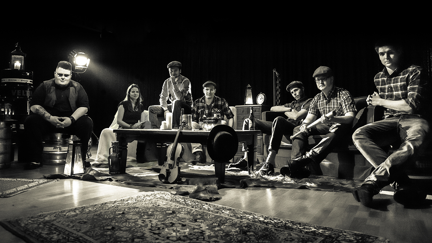 Die 7 köpfige Band "The O'Reillys and the Paddyhats"